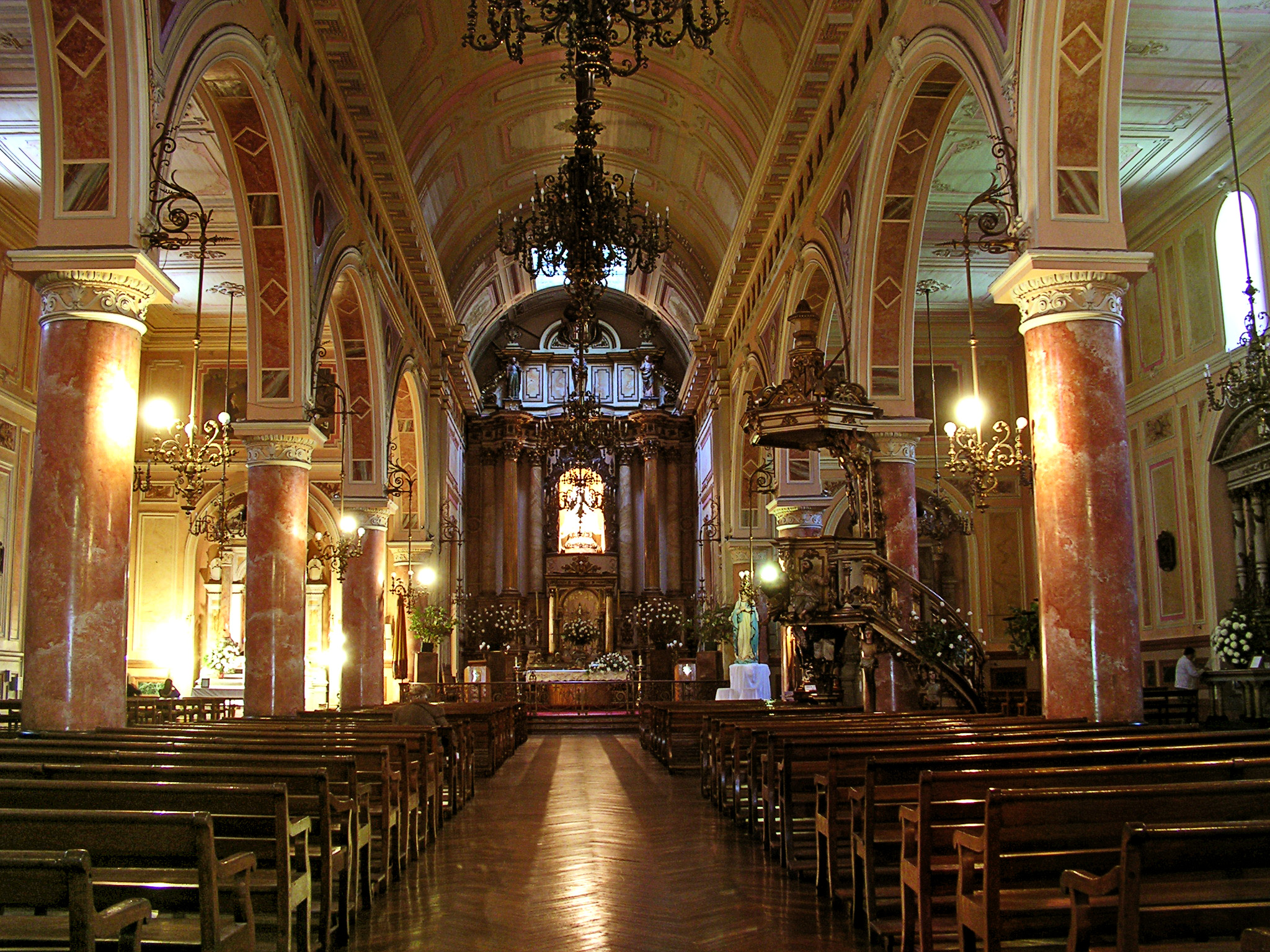 Iglesia de La Merced y parte del Convento This is a photo of a national monument in Chile: 250